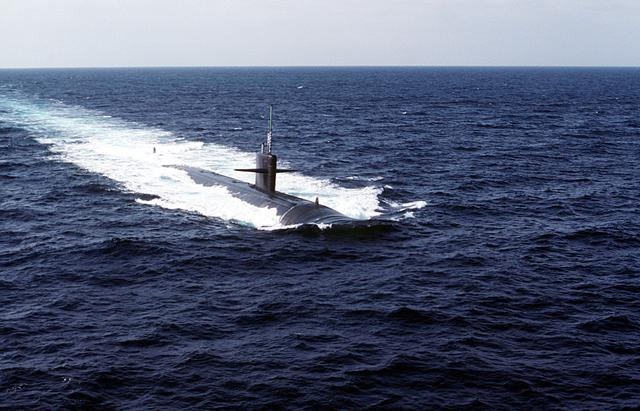 USS Phoenix (SSN-702)